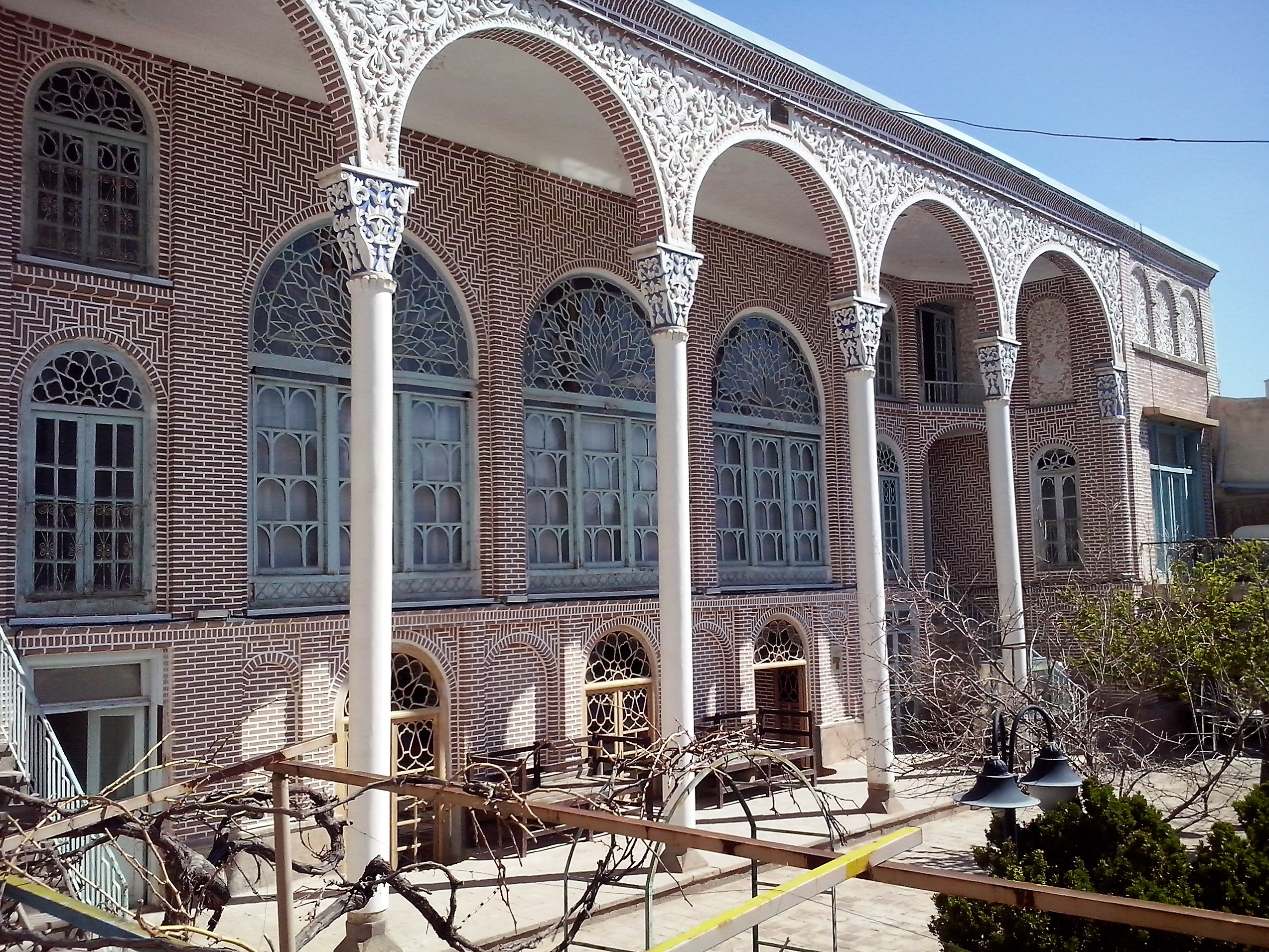 خانه نیکدل در تبریز.